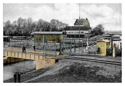 Postkarte mit Eisenbahndrehbrücke Lötzen (mit Titel nachgearbeitet)